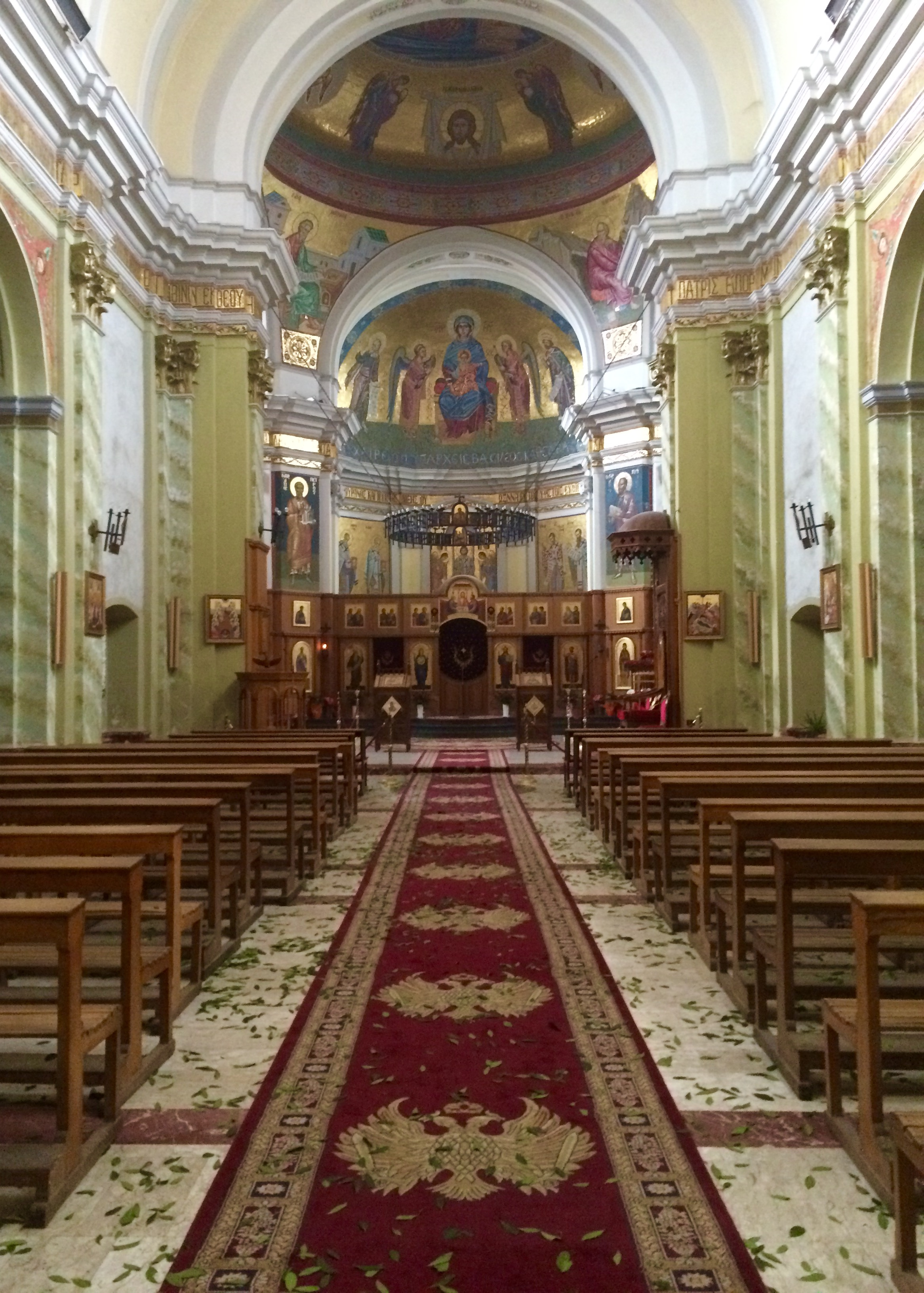 Navata centrale della Cattedrale di Lungro cosparsa di foglie di alloro il Sabato Santo